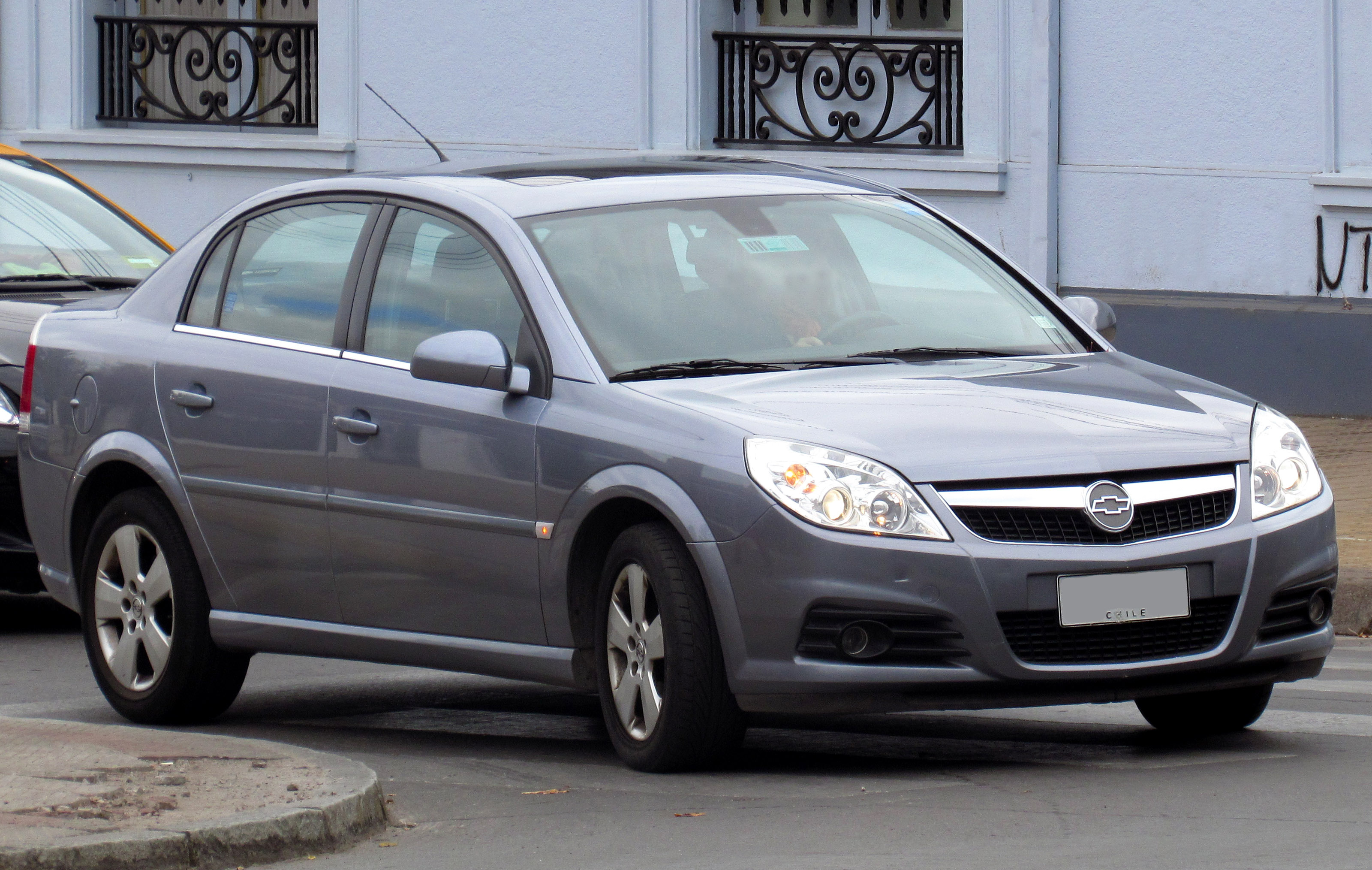 Chevrolet Vectra 2.2 Elegance 2007